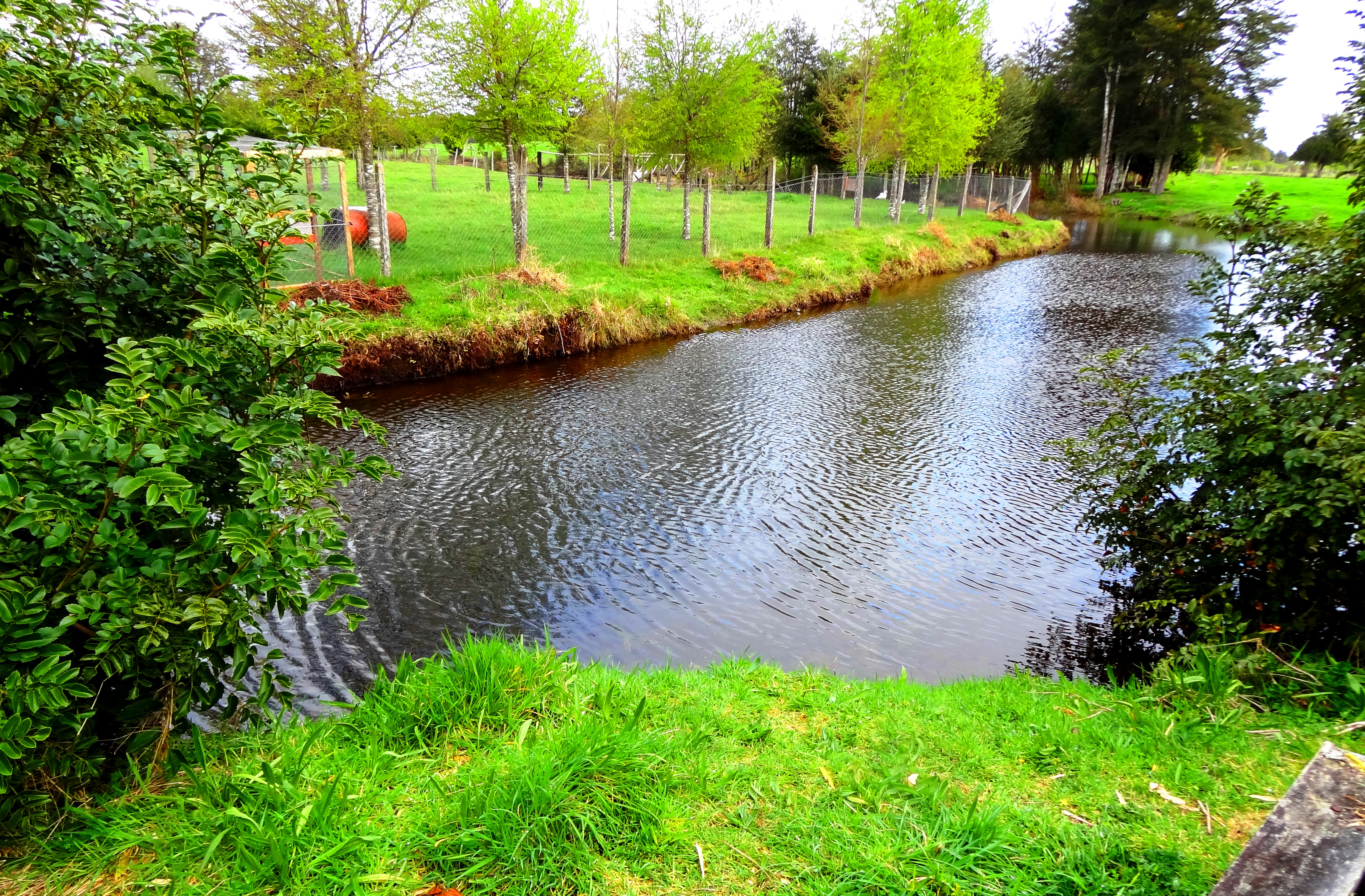 Sitios arqueológicos Monte Verde y Chinchihuapi This is a photo of a national monument in Chile: 2012